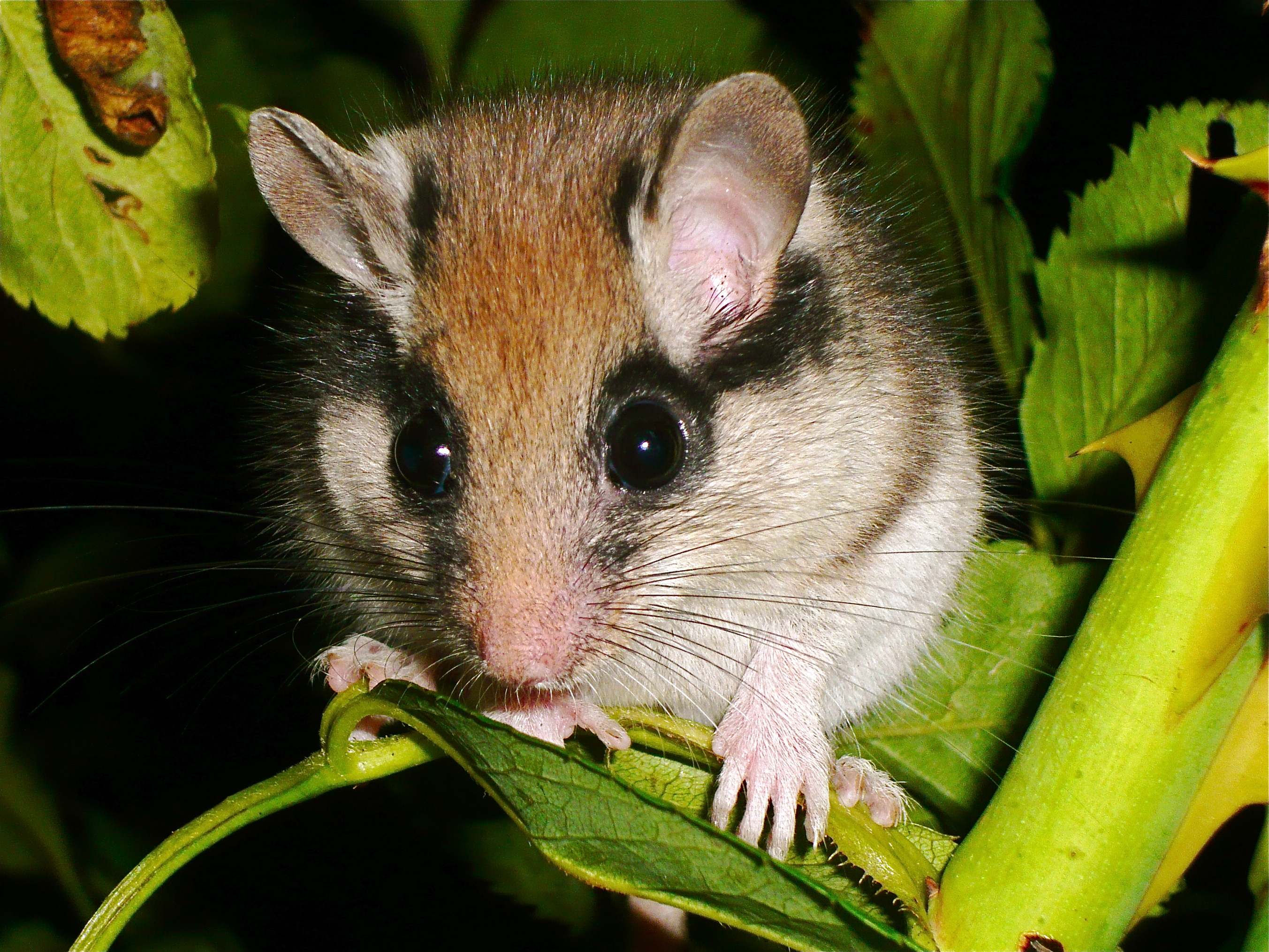 Lérot sauvage en Bresse